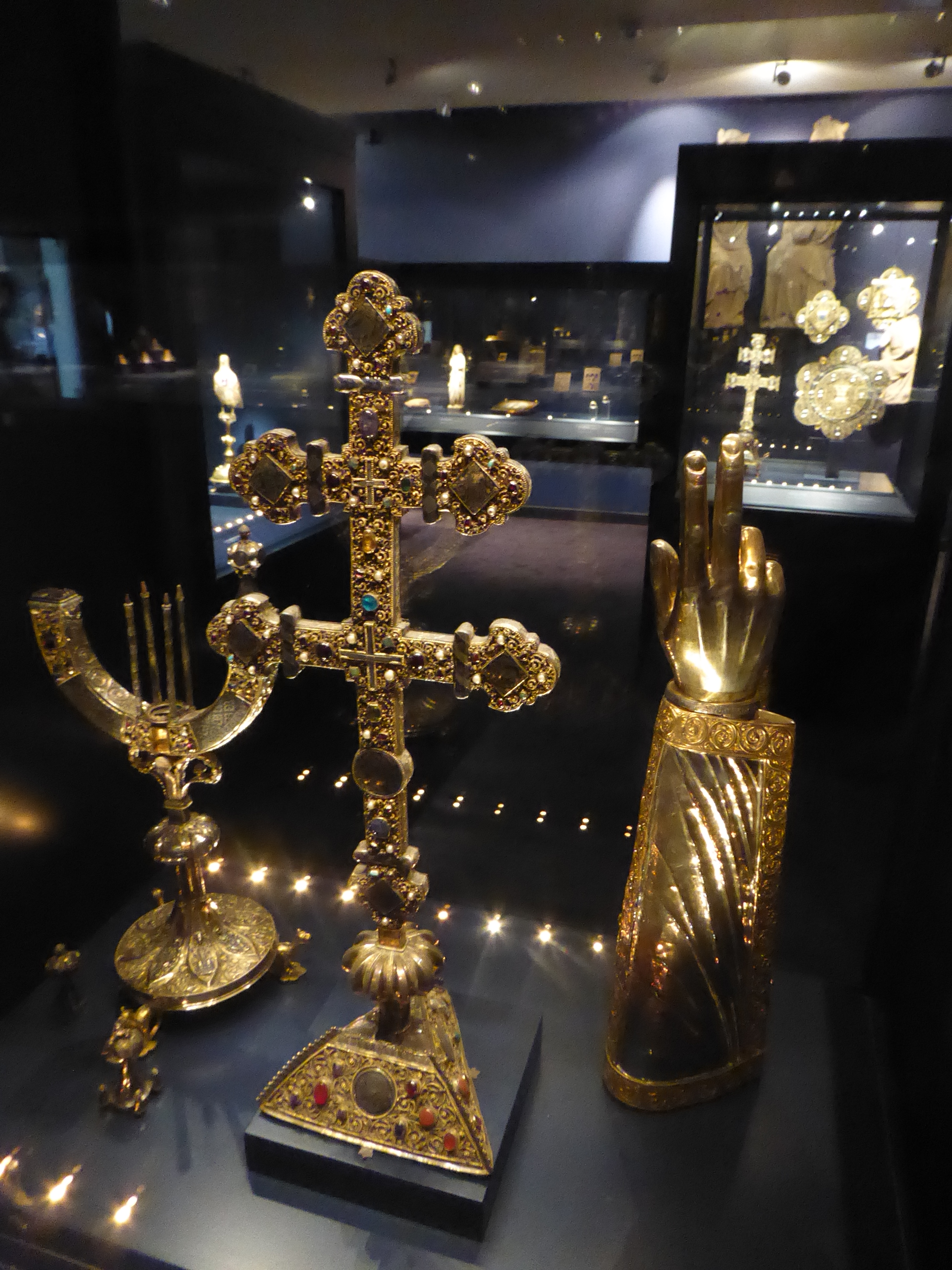 De gauche à droite: Reliquaire de la côte de saint Pierre; Croix-reliquaire à double traverse et bras-reliquaire.